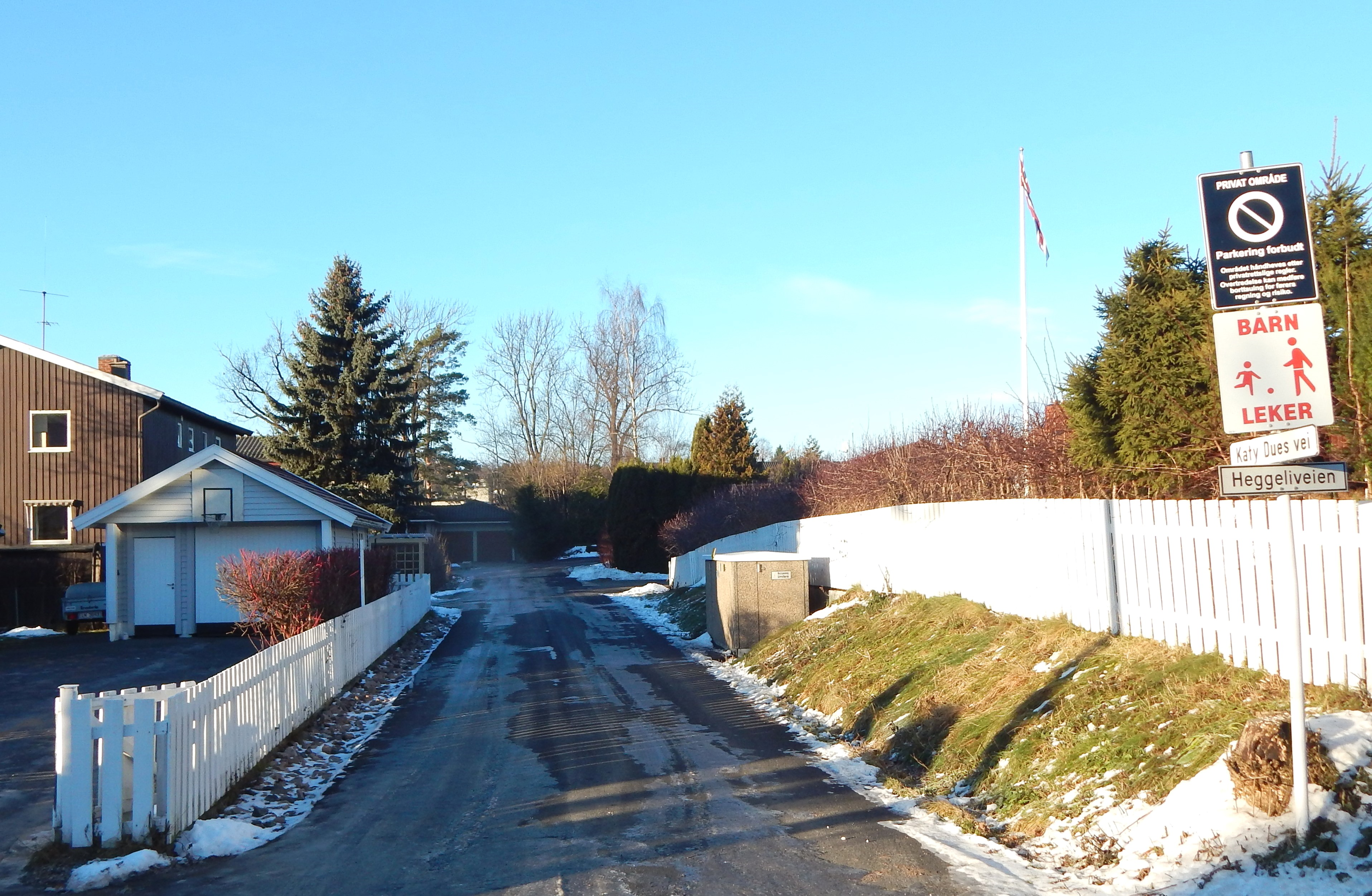 Katy Dues vei sett fra Heggeliveien